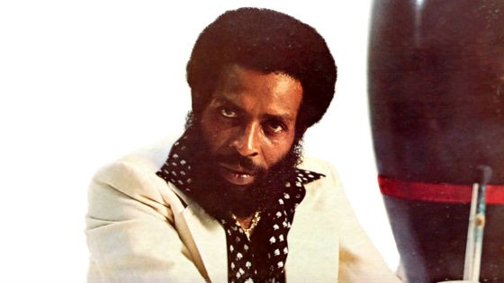 Photo de King Sporty